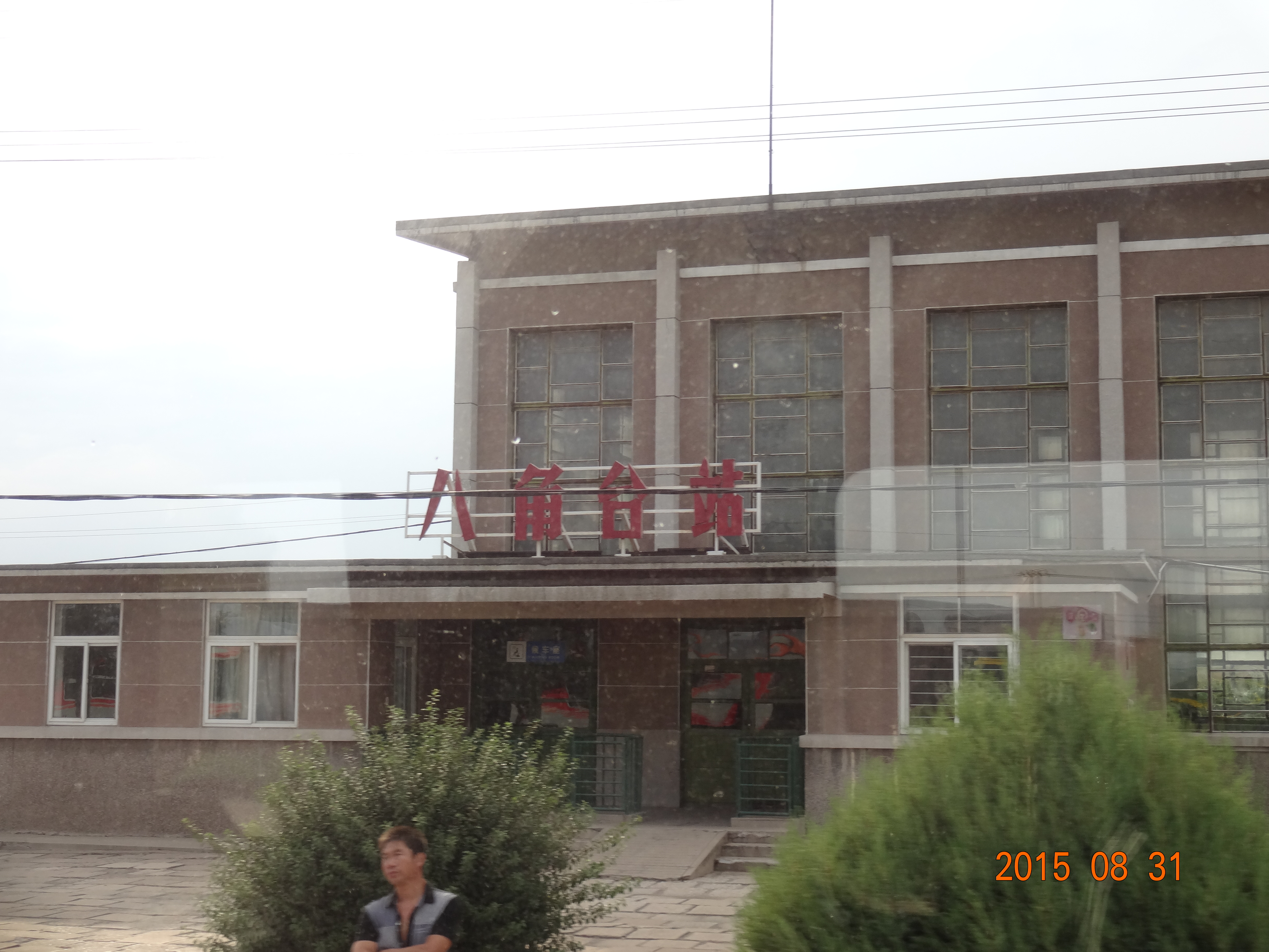 八角台站